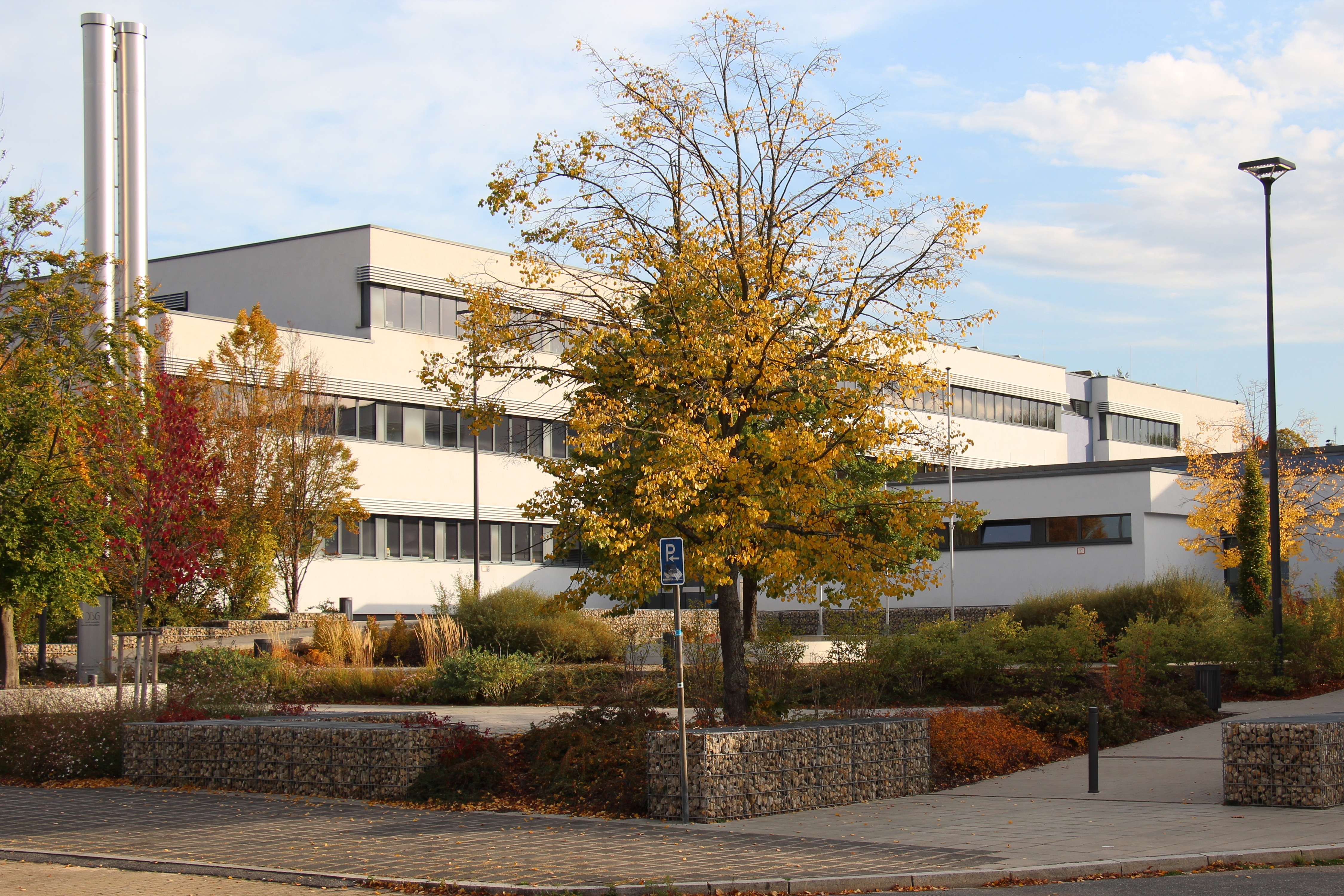 Das Foto zeigt den sog. Vorplatz (Nordseite) des Dietrich-Bonhoeffer-Gymnasiums Oberasbach.